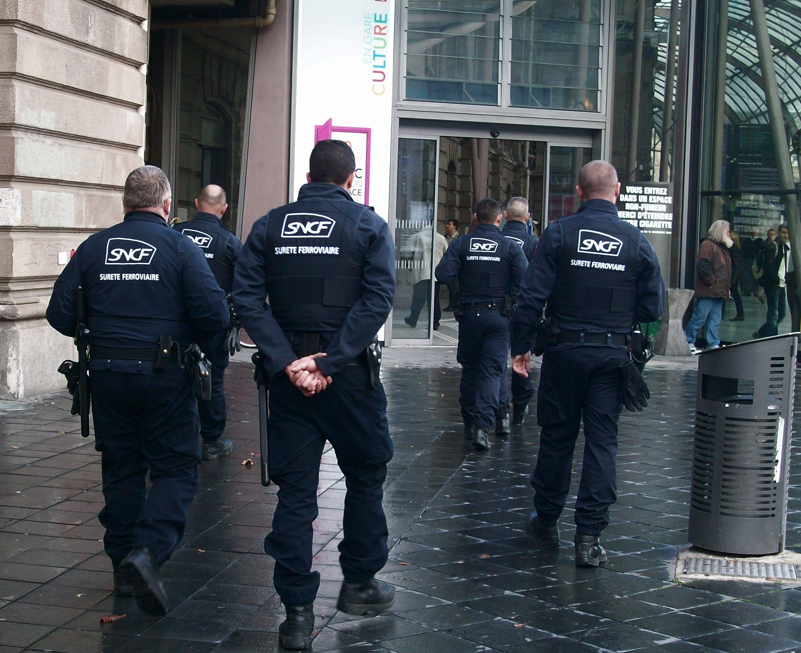 Agents de la police ferroviaire SNCF (SUGE ou Sûreté ferroviaire) en gare de Strasbourg.